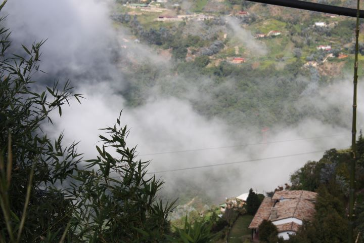 Galipan (Parque Nacional El Avila), estado Vargas - Venezuela (2008)